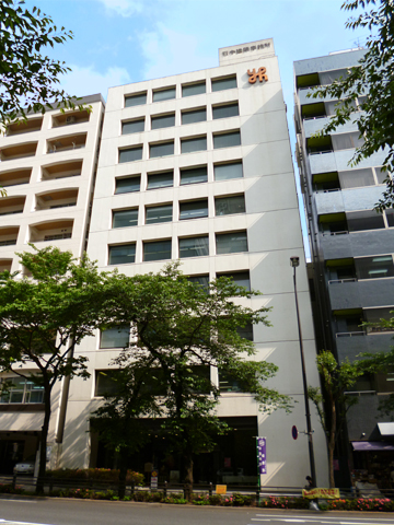 石本建築事務所 本社ビル（千代田区）